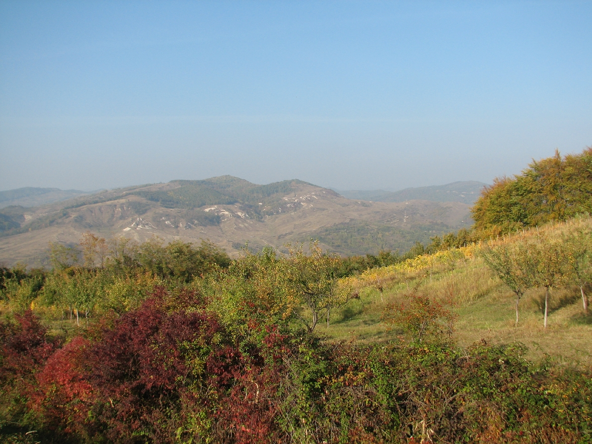 Silistea Tataru